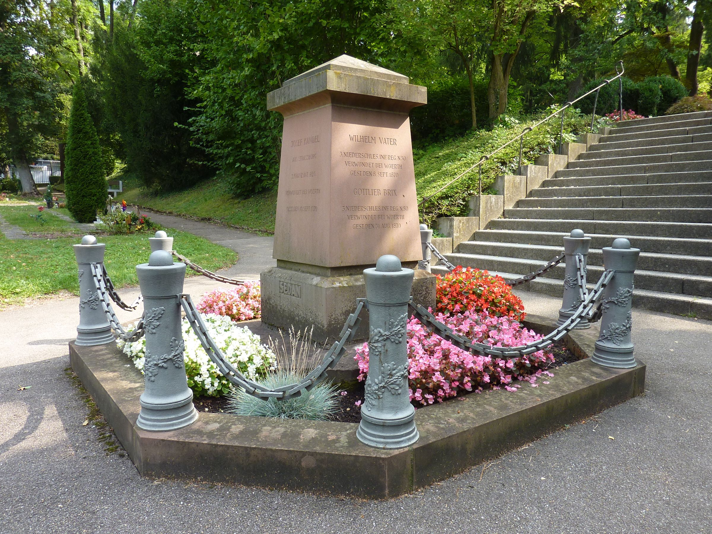 Denkmal für Gefallene des Krieges 1870/71